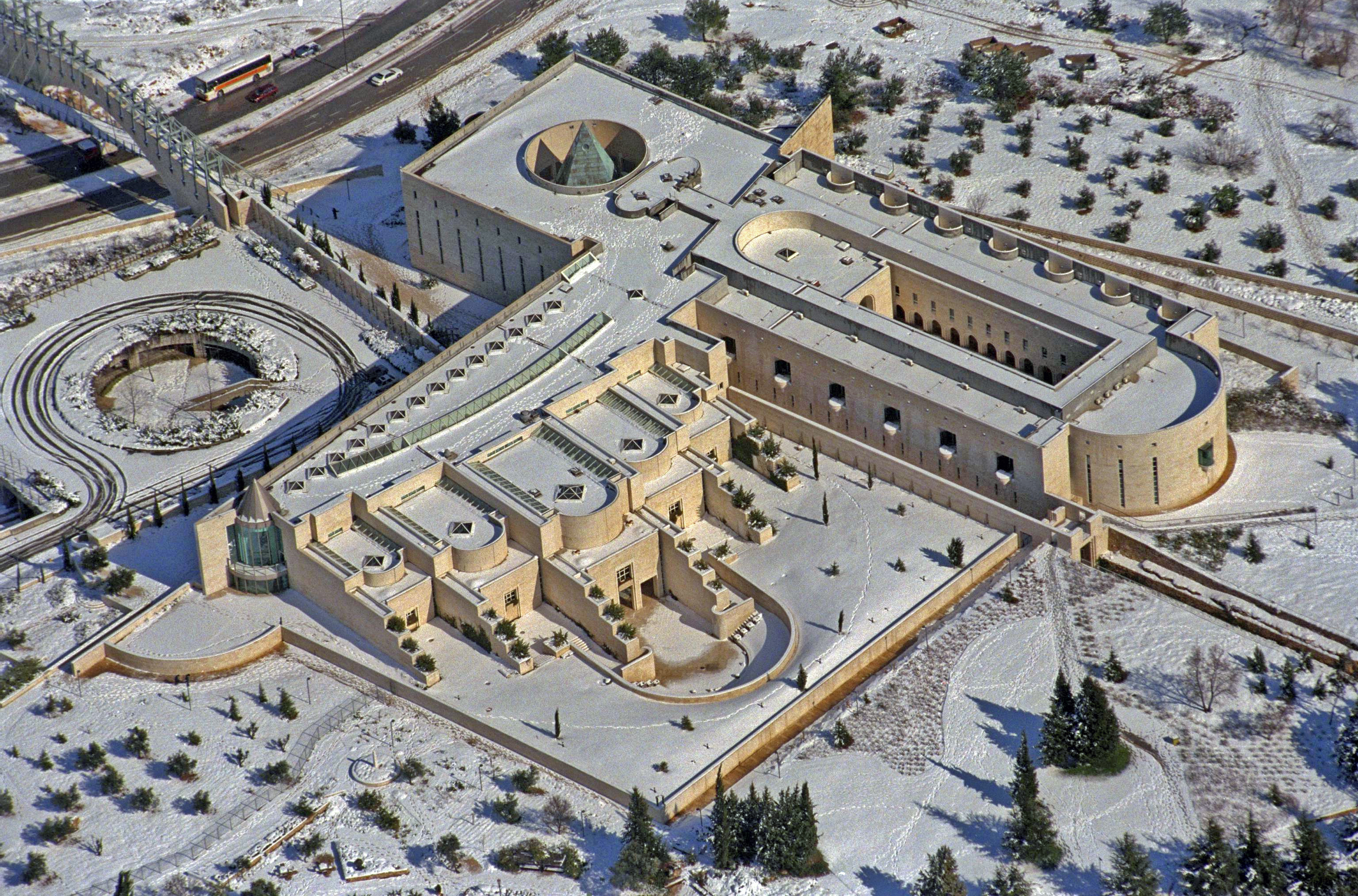 An aerial photo of the supreme court building in Jerusalem covered with snow on a bright winter day. צילום אווירי של משכן בית המשפט העליון בירושלים מכוסה כולו שלג